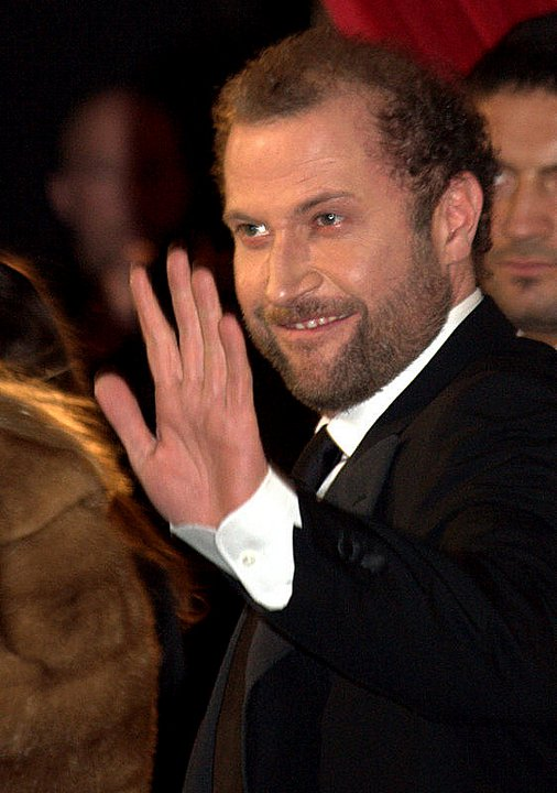 François Damiens à la cérémonie des César